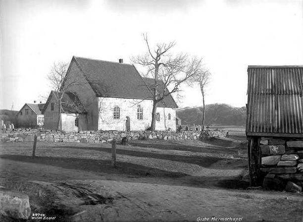 Giske kyrkje